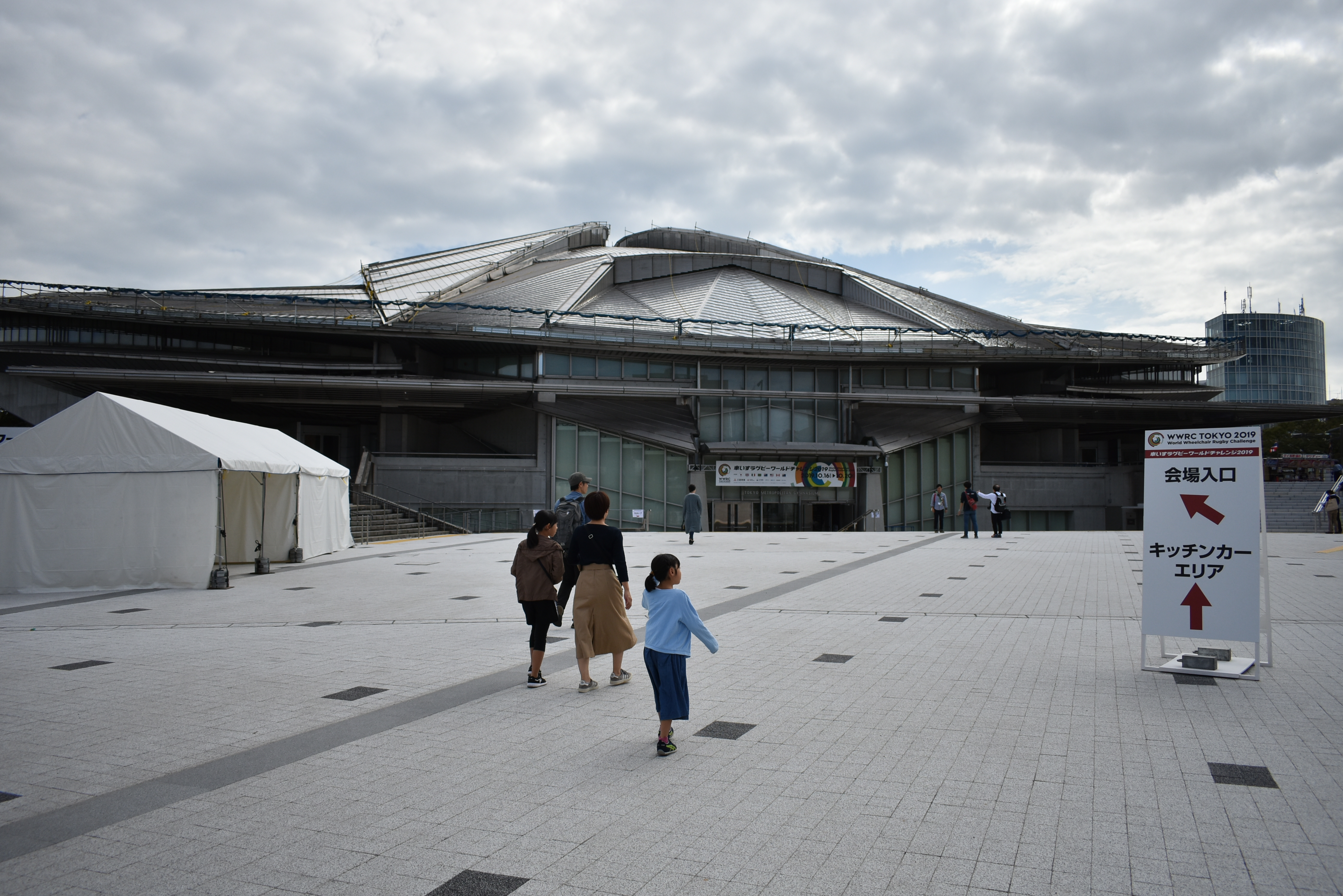 東京体育館